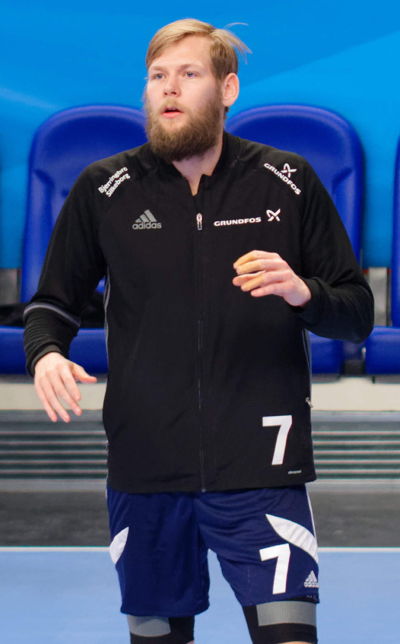 Rencontre de phase de groupe de la ligue des champions 2016-17 entre le PSG et Bjerringbro-Silkeborg. A Coubertin, le 11 février 2017.